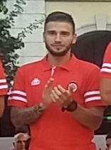 Portu en la presentación de la temporada 2016/17